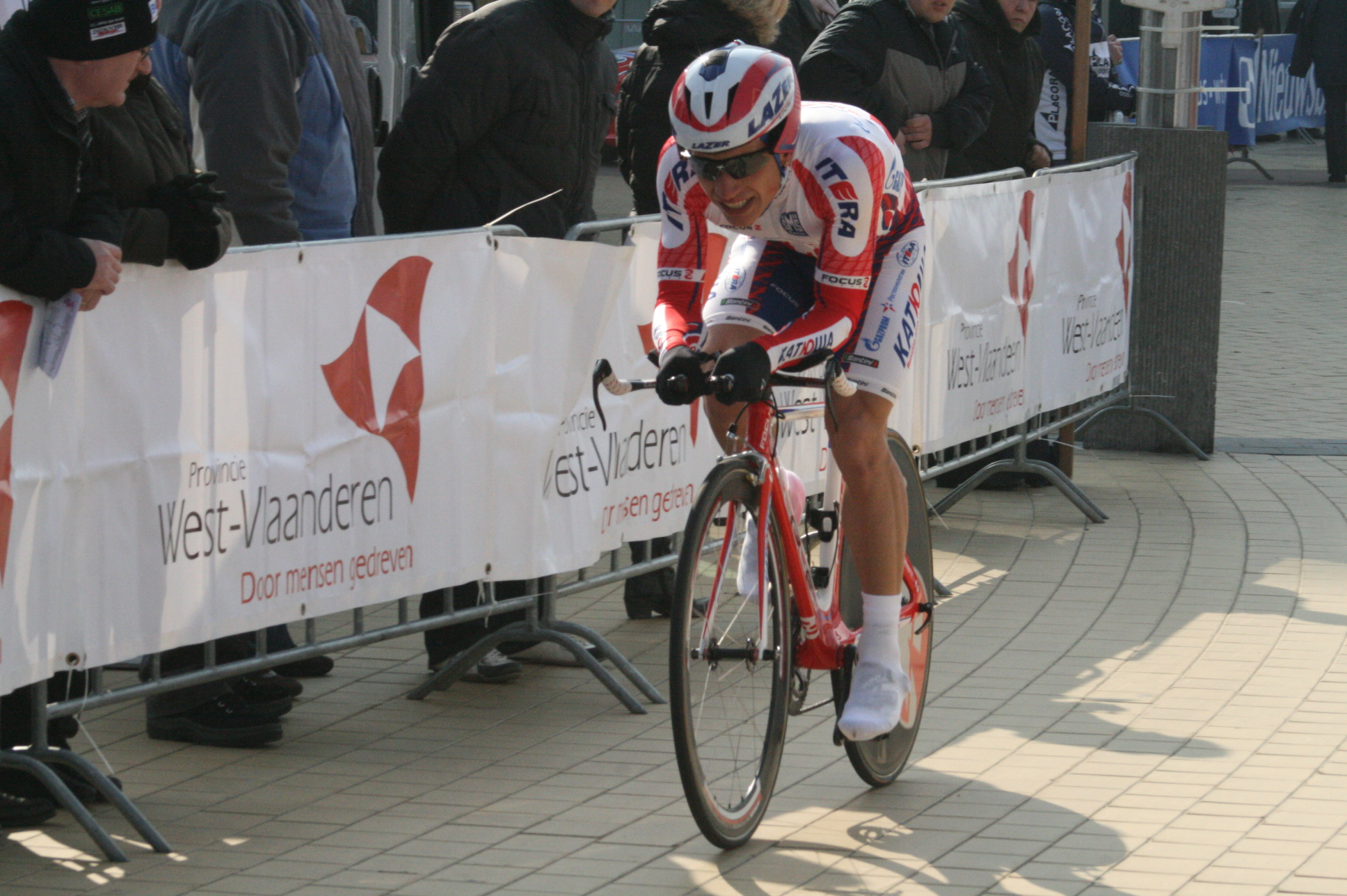 Driedaagse van West-Vlaanderen 2011, proloog in Middelkerke